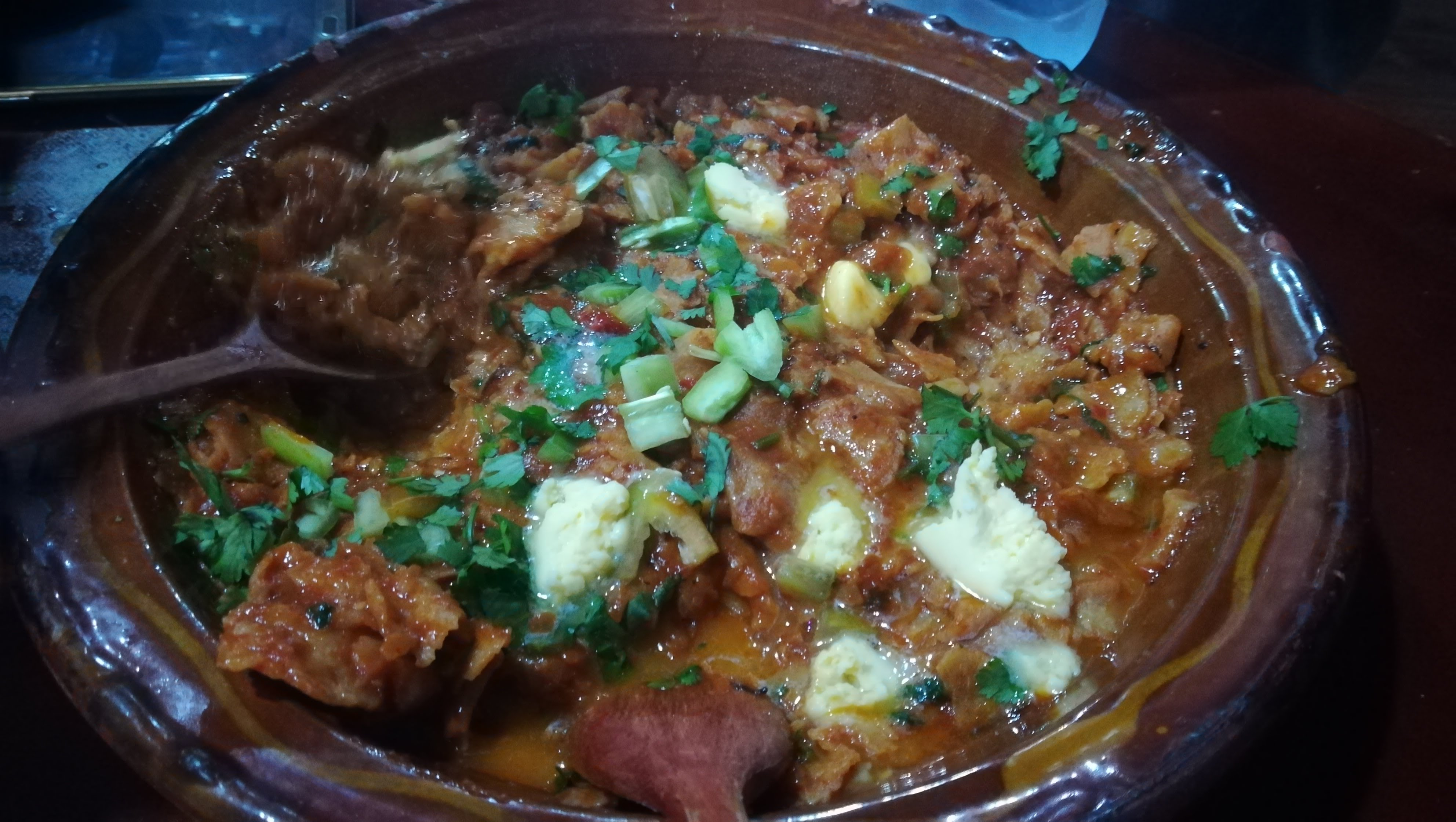 الشخشوخة المسيلية هي أكلة تقليدية خاص بسكان مدينة المسيلة بالجزائر.